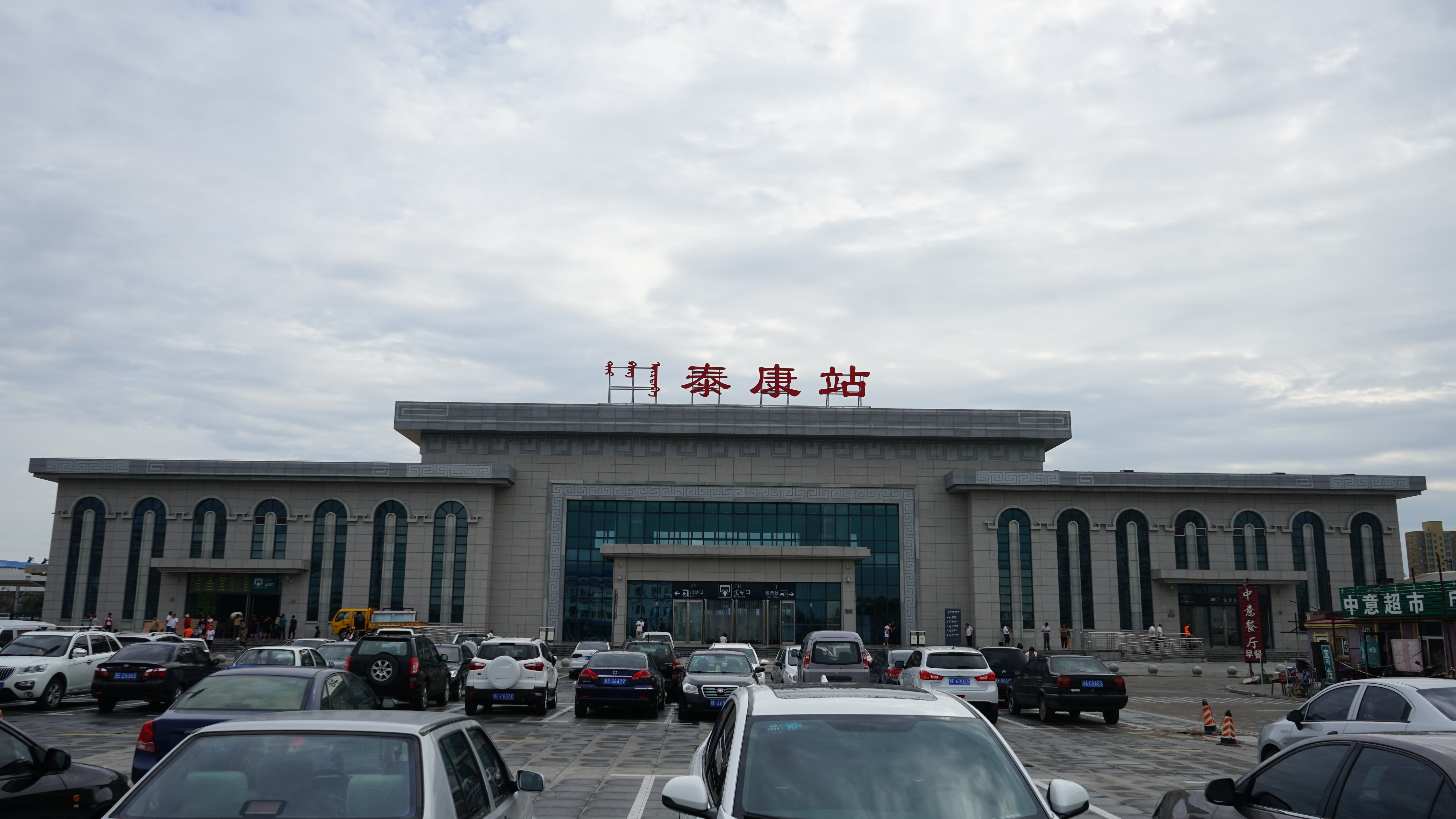 中文（中国大陆）: 杜尔伯特县：泰康站